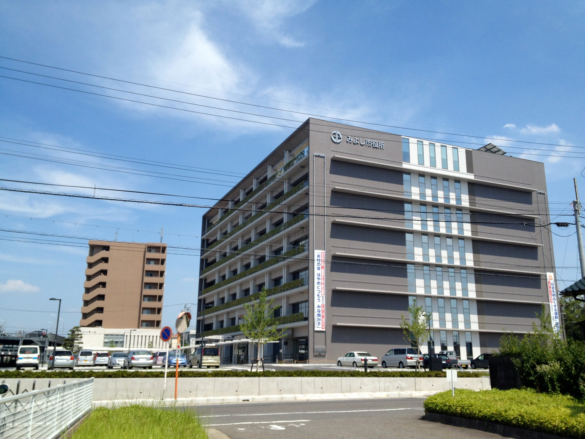 みよし市役所庁舎